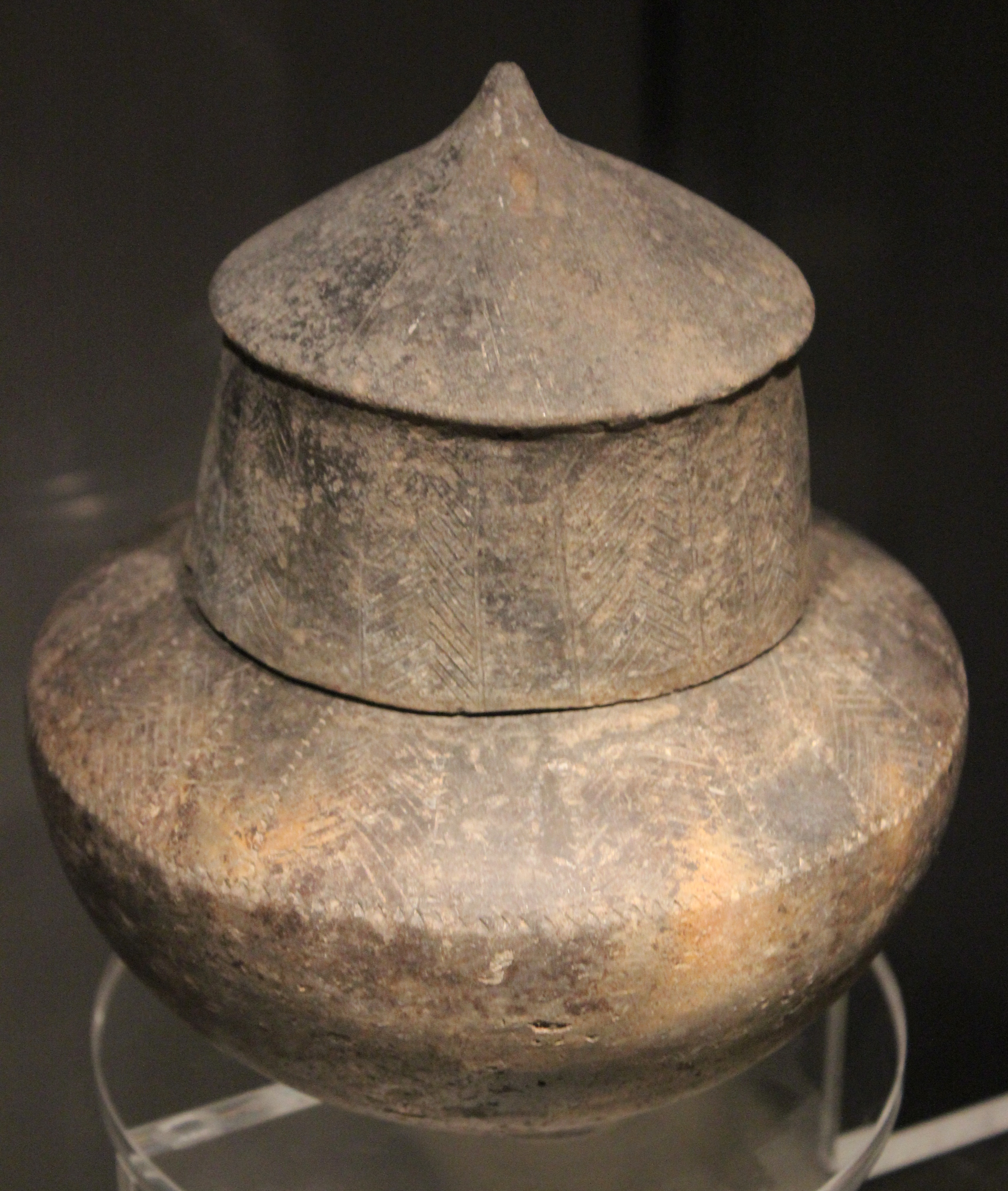 Paestum. Museo Archeologico Nazionale. Cerámica de la cultura del Gaudo.